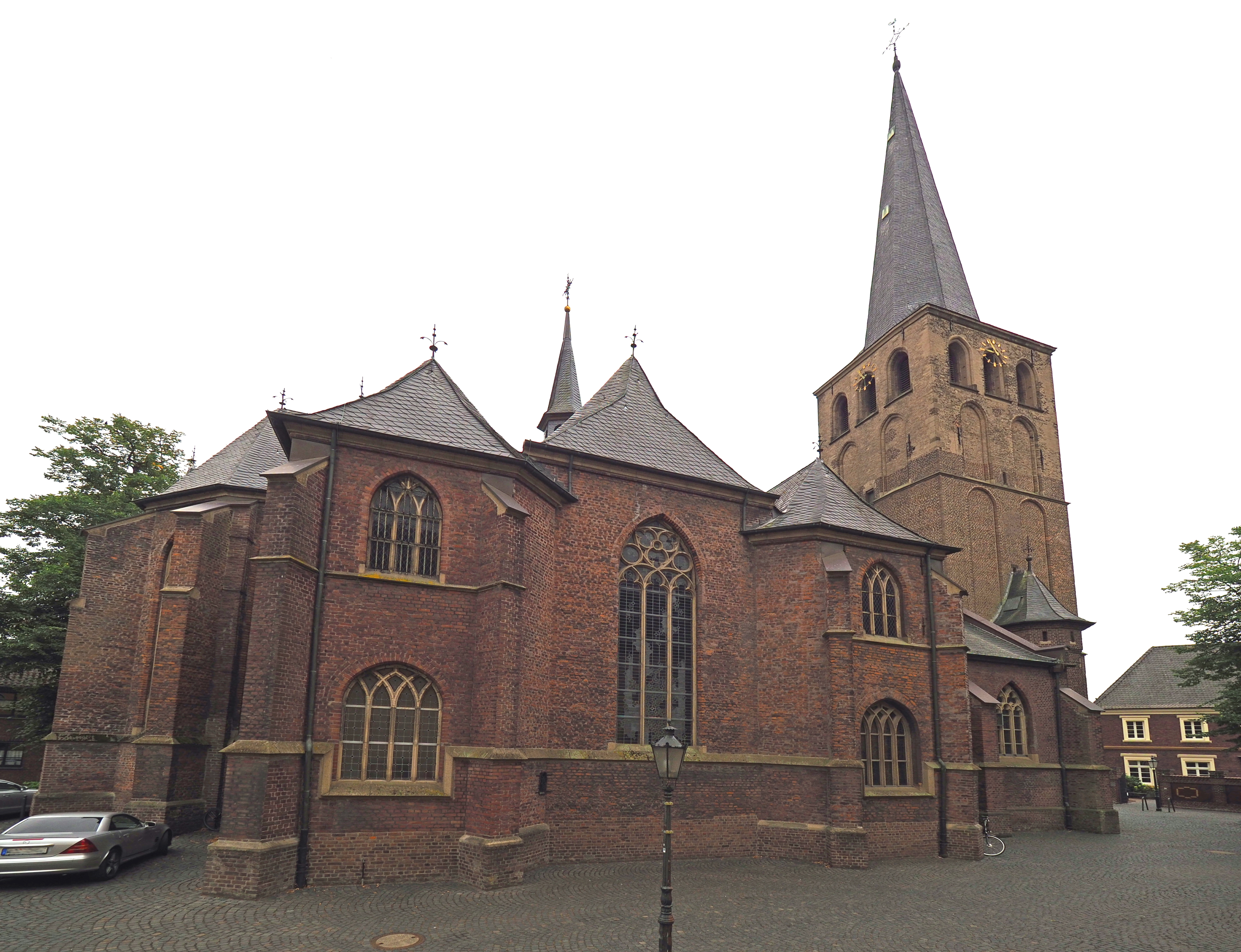 Pfarrkirche "St.Michael" in Wachtendonk von Norden, im Vordergrund cabaneskapelle von 1523; Bearbeitung: Drehung um 2,4° im Uhrzeigersinn, Reduktion des Fischaugeneffektes durch Halbierung des Sturzes der Senkrechten und durch waagerechte Schrumpfung des mittleren Bereichs von 350 dpi auf 300 dpi, dazu Erhhung der Helligkeit um 36%, Kontrast und Sättigung um je 18%